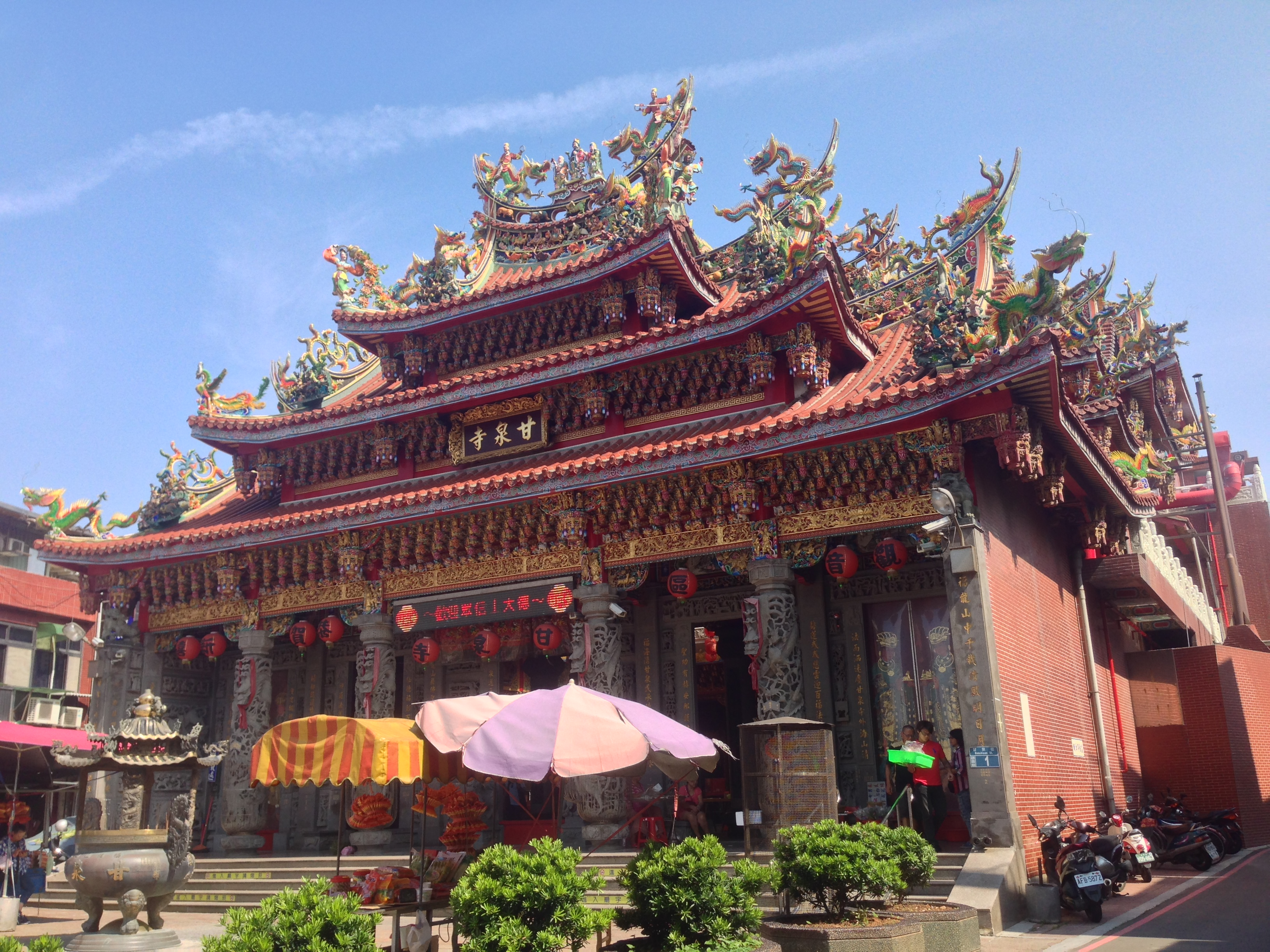 中文（台灣）: 甘泉寺斜照